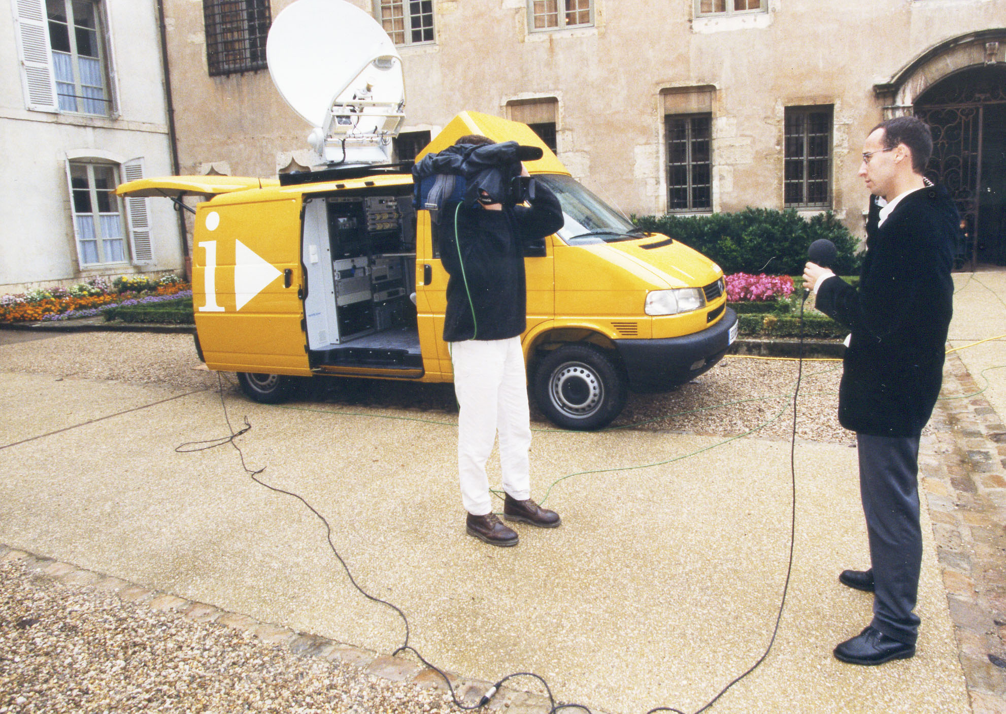 L'un des "VS" (véhicule satellite) de la chaîne d'information i-télé.